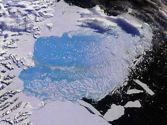 Льодовик Ларсена у процесі руйнування. Супутникова світлина: Льодовик Ларсена у процесі руйнування. Супутникова світлина